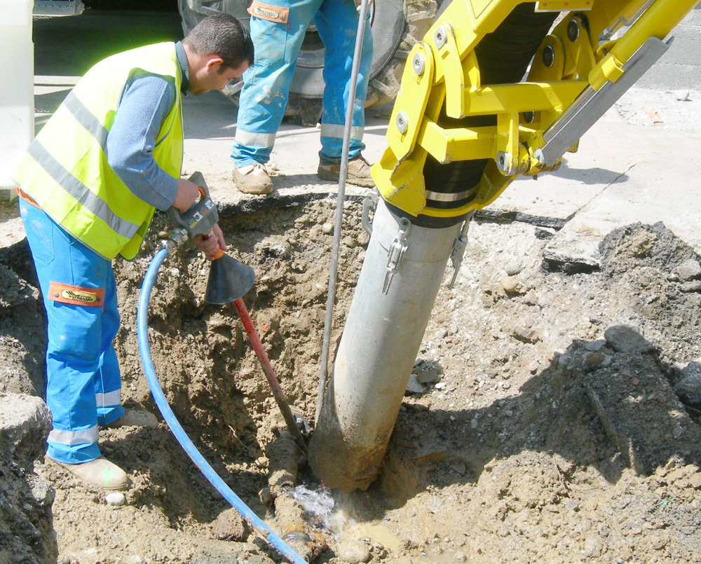 Dégagement d'une canalisation avec une fuite d'eau avec l'excavatrice-aspiratrice